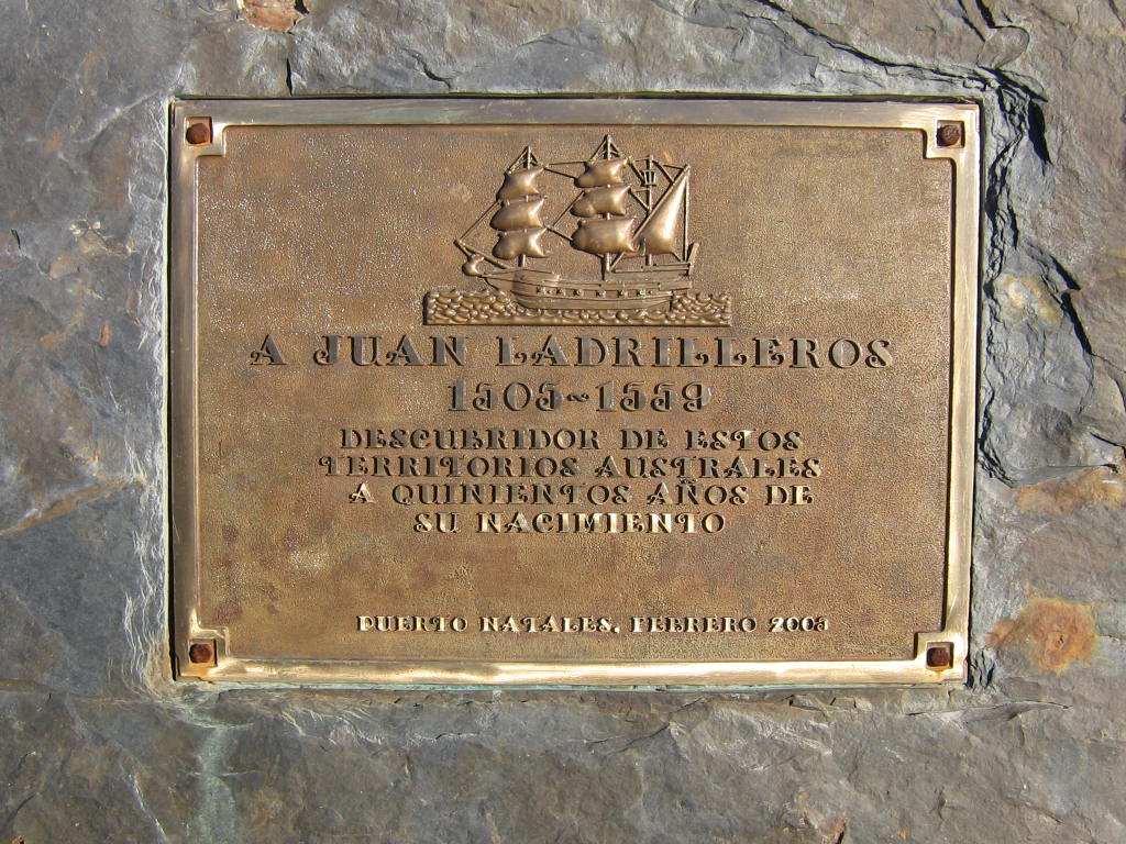 Detalle de la Placa en honor a Juan Ladrillero